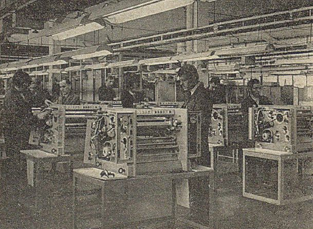 Mera-Błonie. Produkcja mechanizmu drukującego 666/V3 drukarki wierszowej[1]